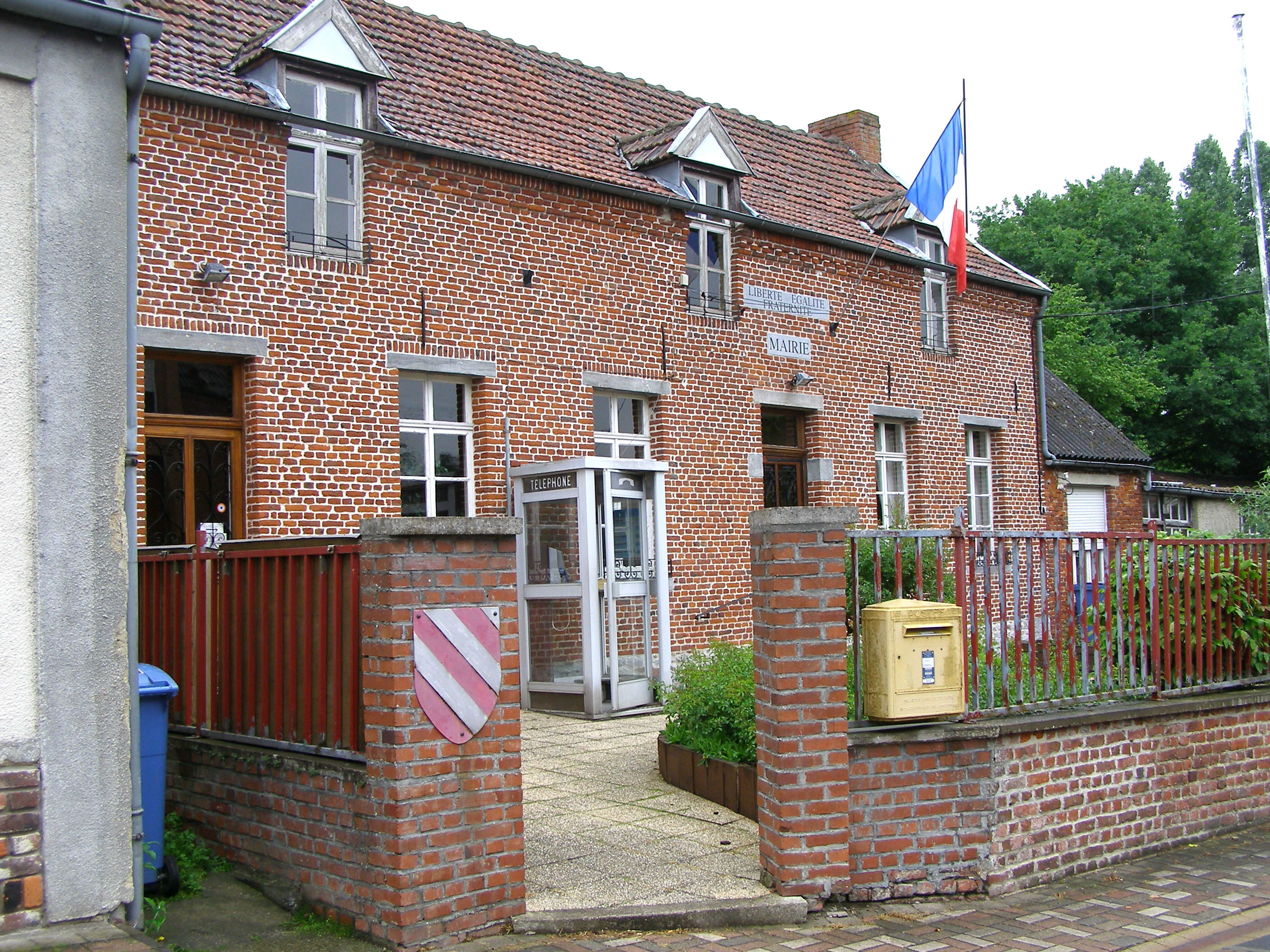 La mairie.